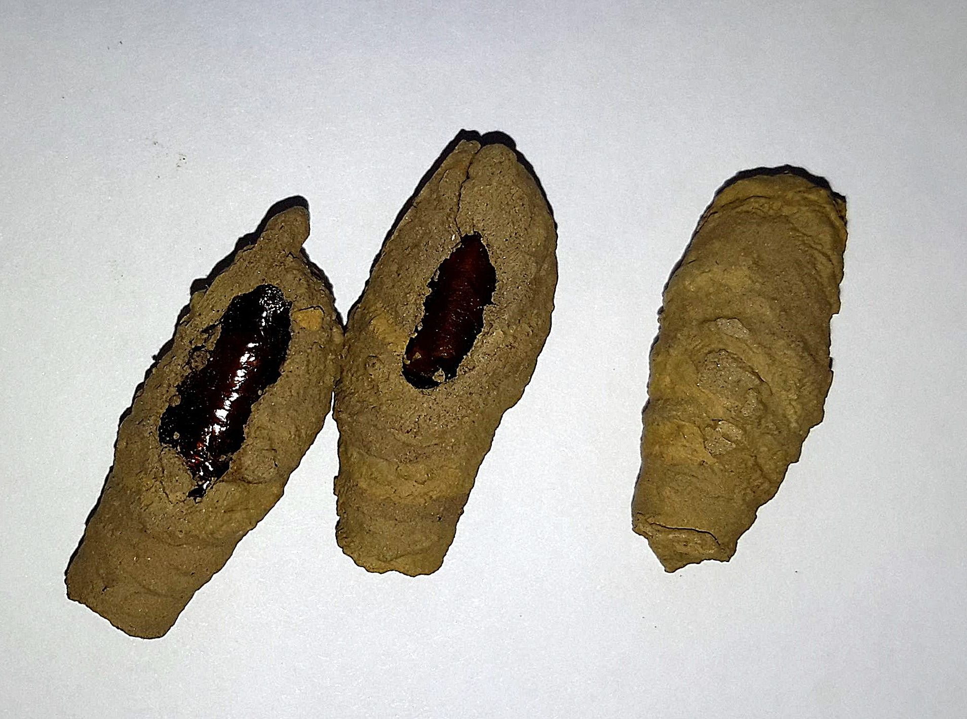 Kokons, vielleicht von Sceliphron curvatum (Orientalische Mörtelwespe)